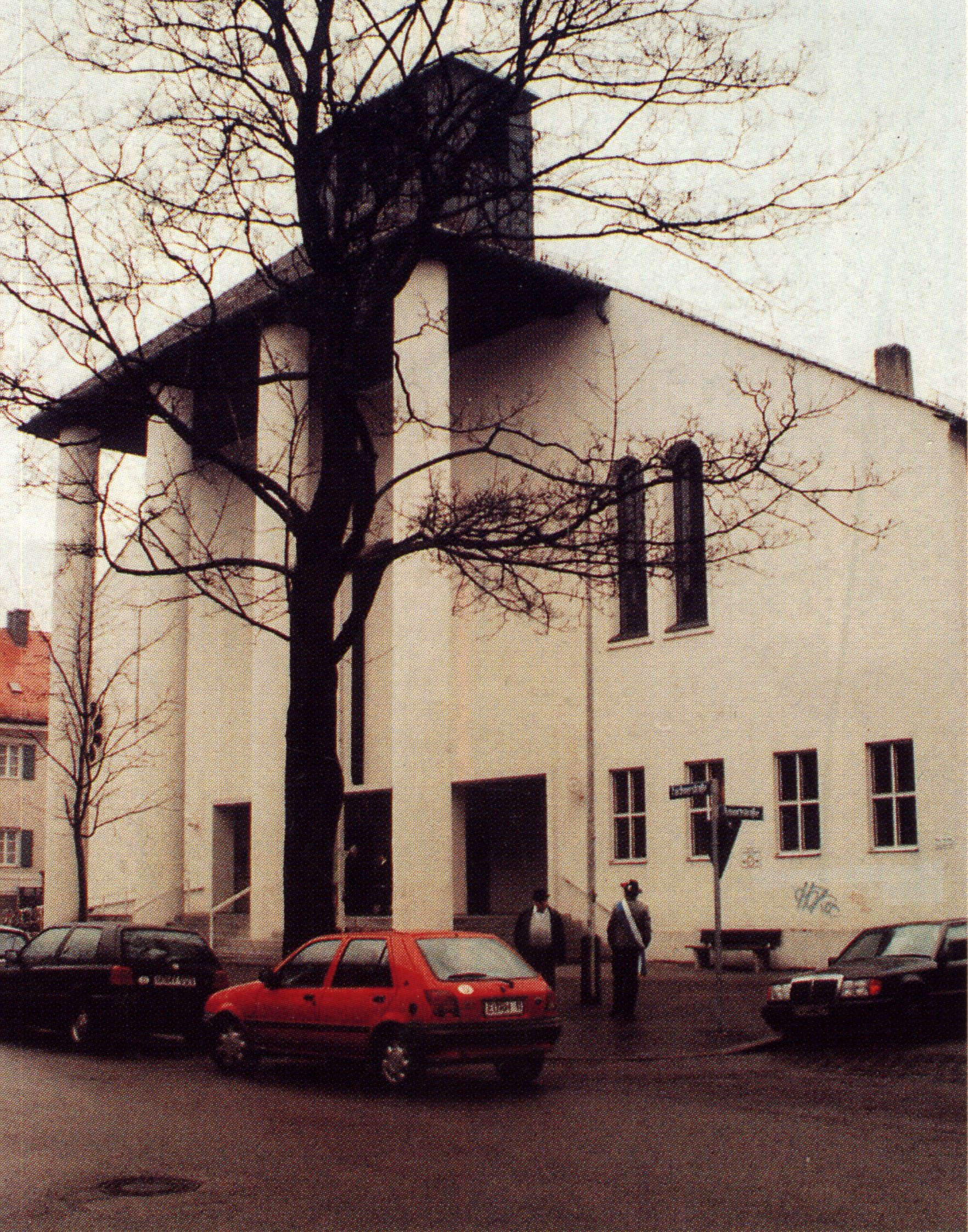 Herz Jesu Kirche in München, Neuhausen; Lachnerstraße, 1993, zweite Kirche an dieser Stelle. Errichtet: 1948 bis 1951, Architekt Friedrich Haindl, abgebrannt 1994.